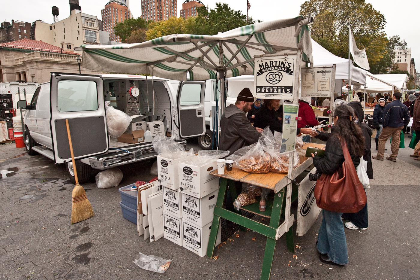 Martain's Handmade Pretzels